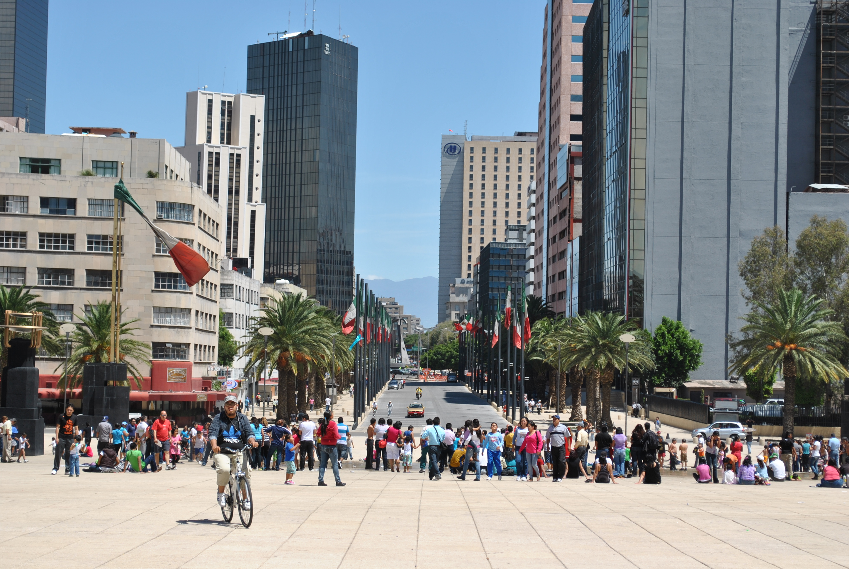 Vista de la Plaza de la República